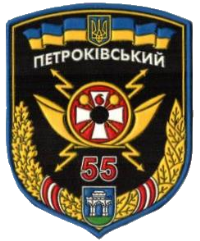 Шеврон 55-го окремого лінійно-вузлового полку зв’язку